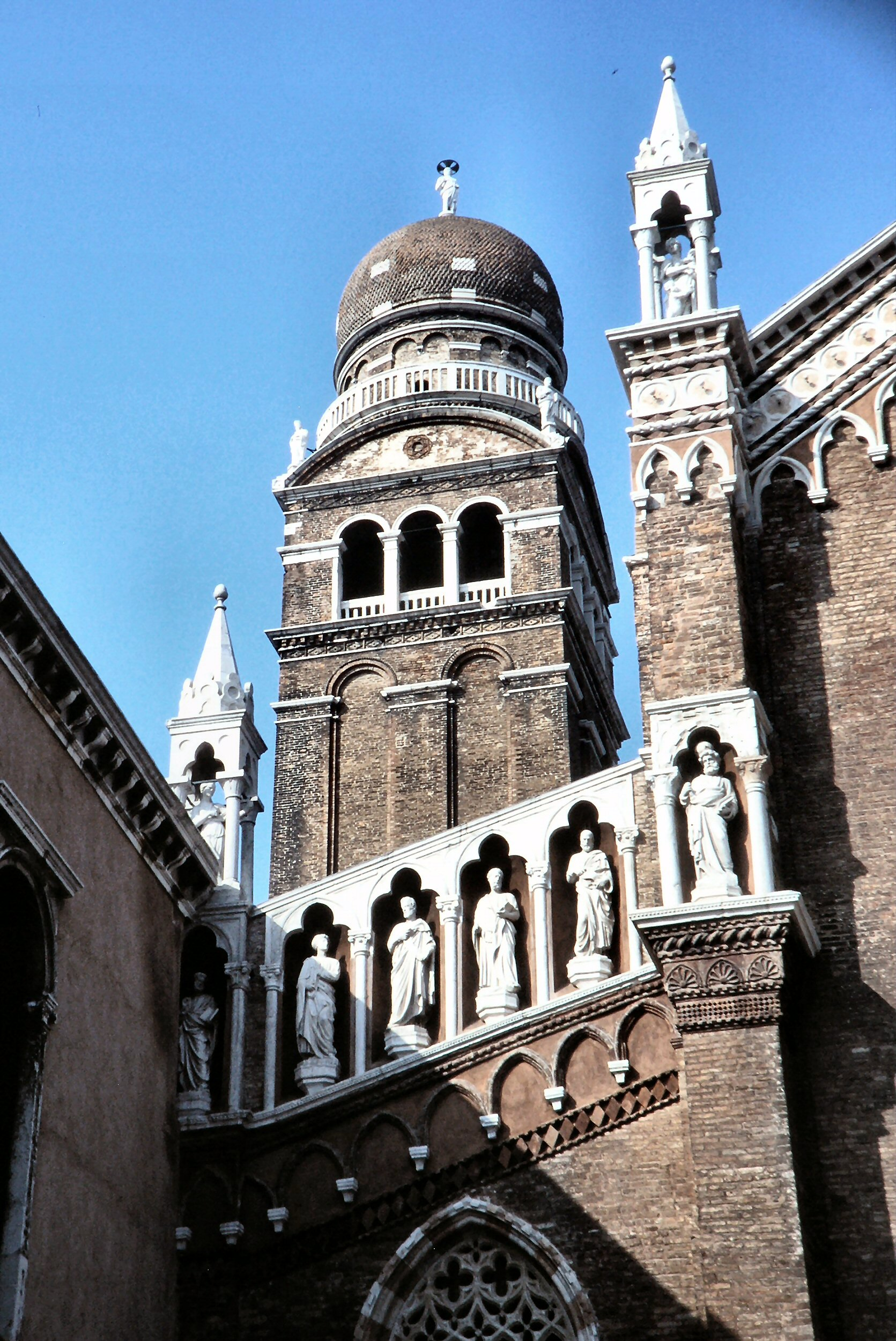 Madonna dell'Orto, Venedig, Fassade (Detail), Turm